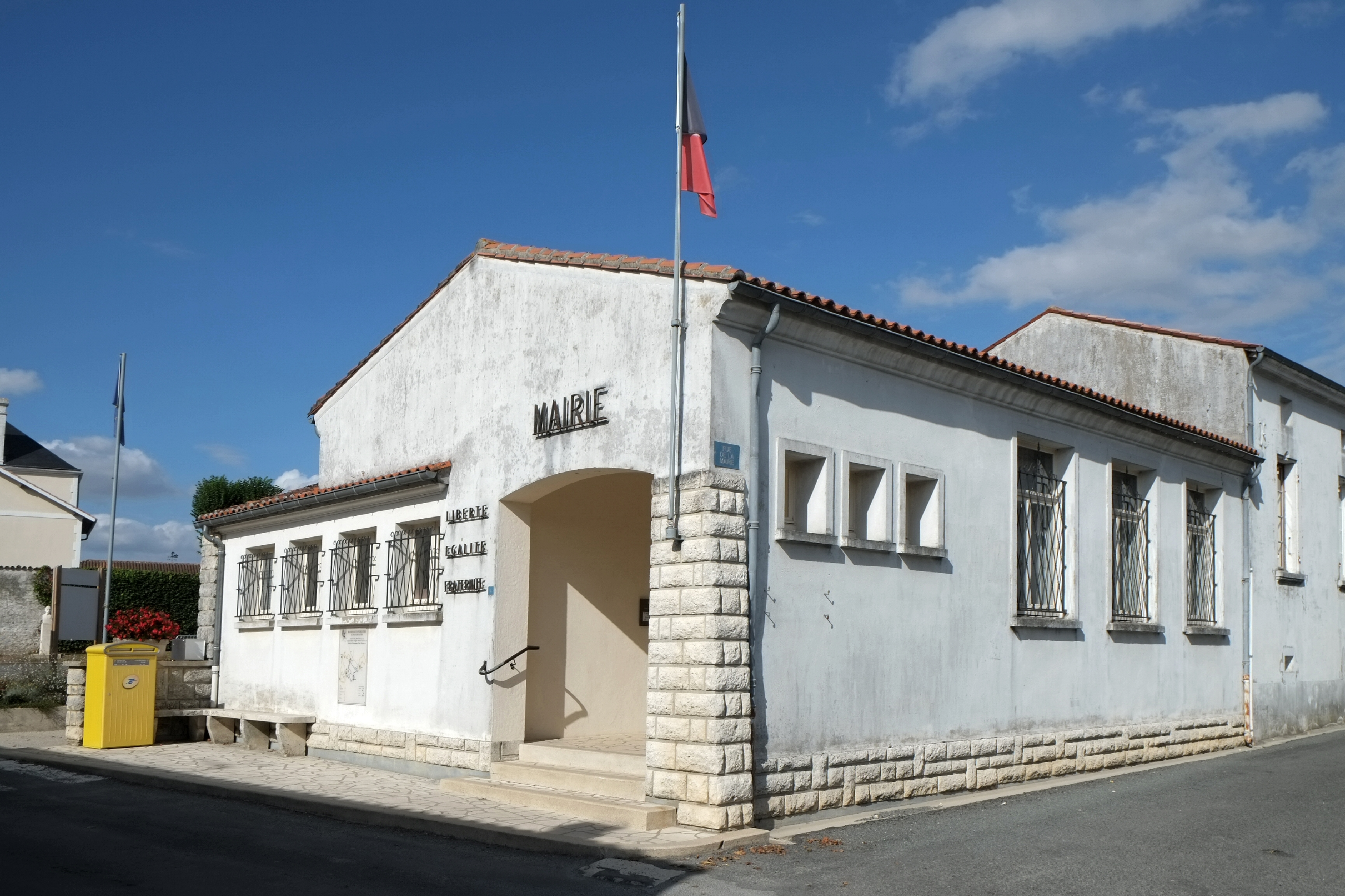 Mairie Sonnac Charente-Maritime France